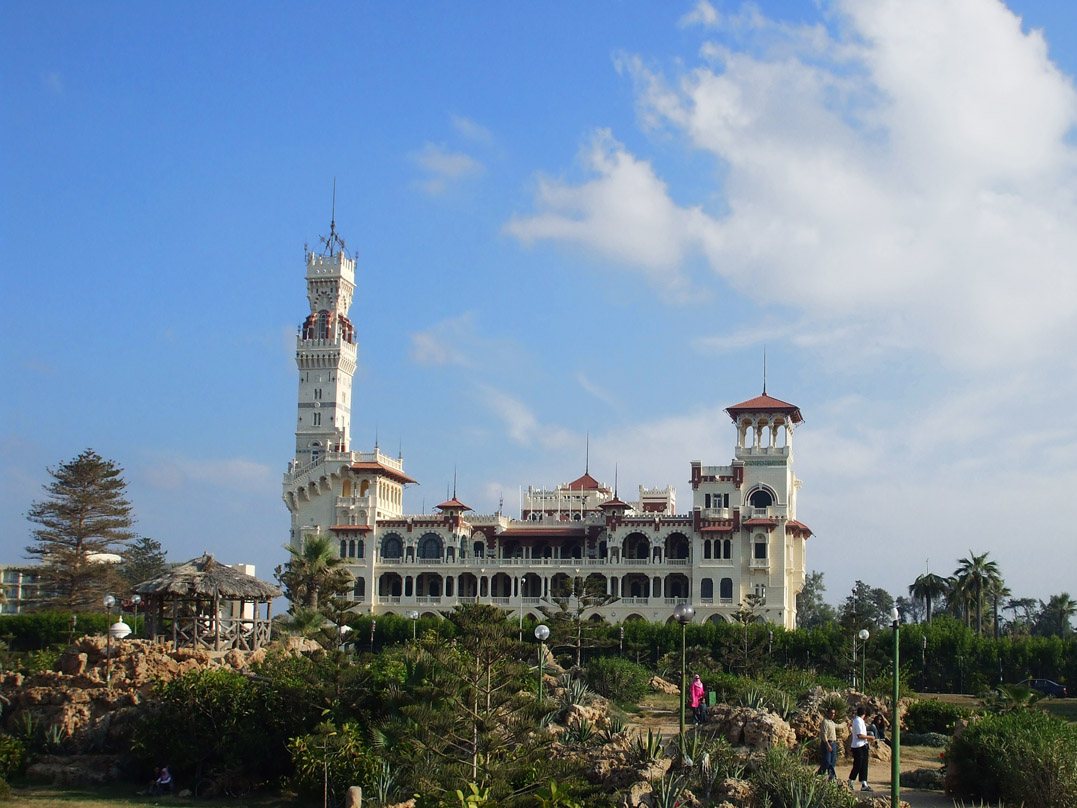 قصر المنتزه بالاسكندرية